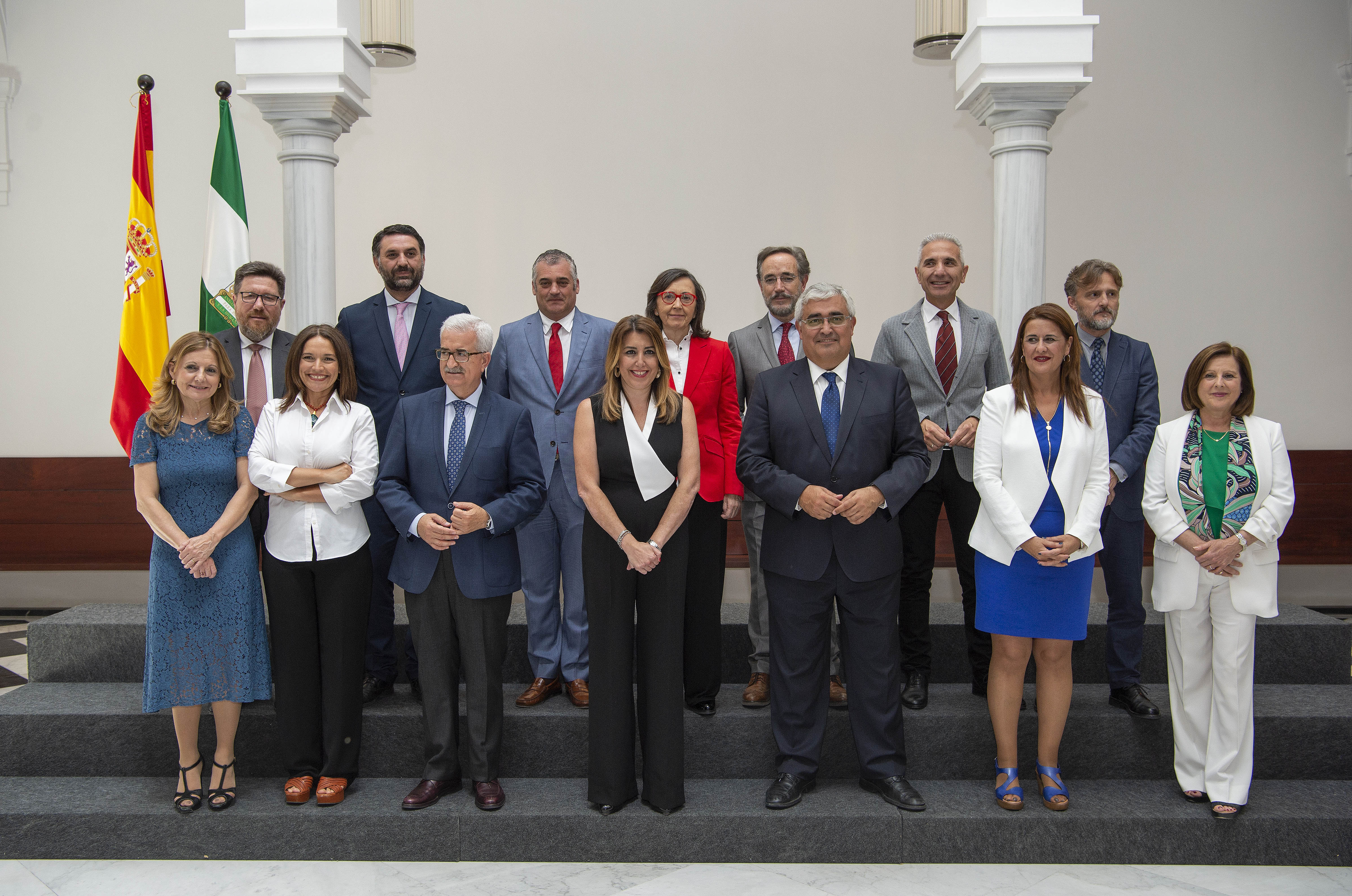 Toma de posesión de los nuevos consejeros de la Junta de Andalucía (7 de junio de 2018).